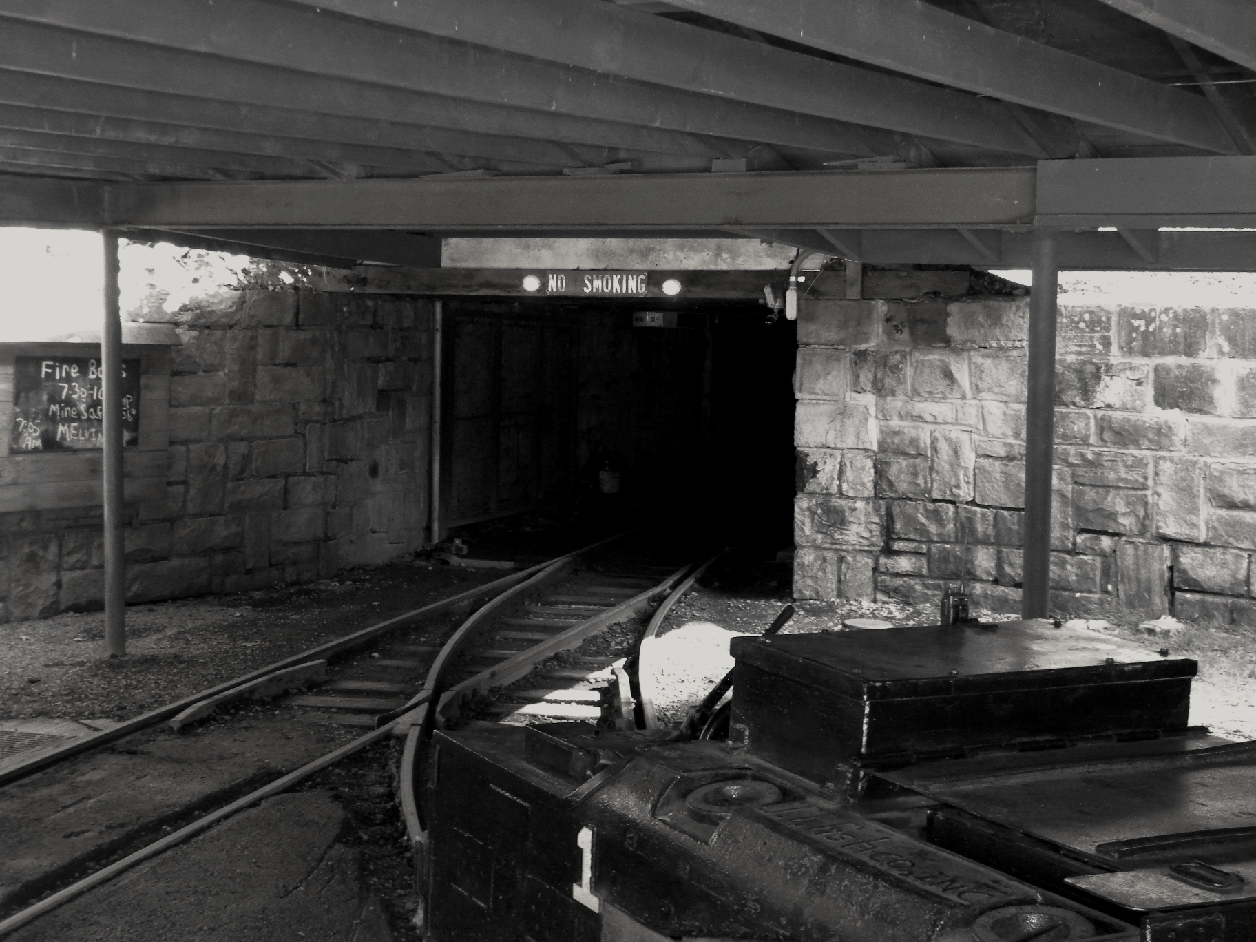 Beckley Exhibition Mine